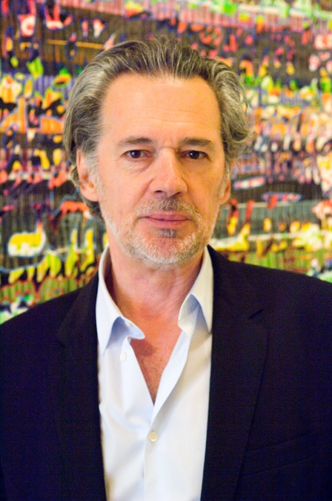 Portait de Bernard Barillot